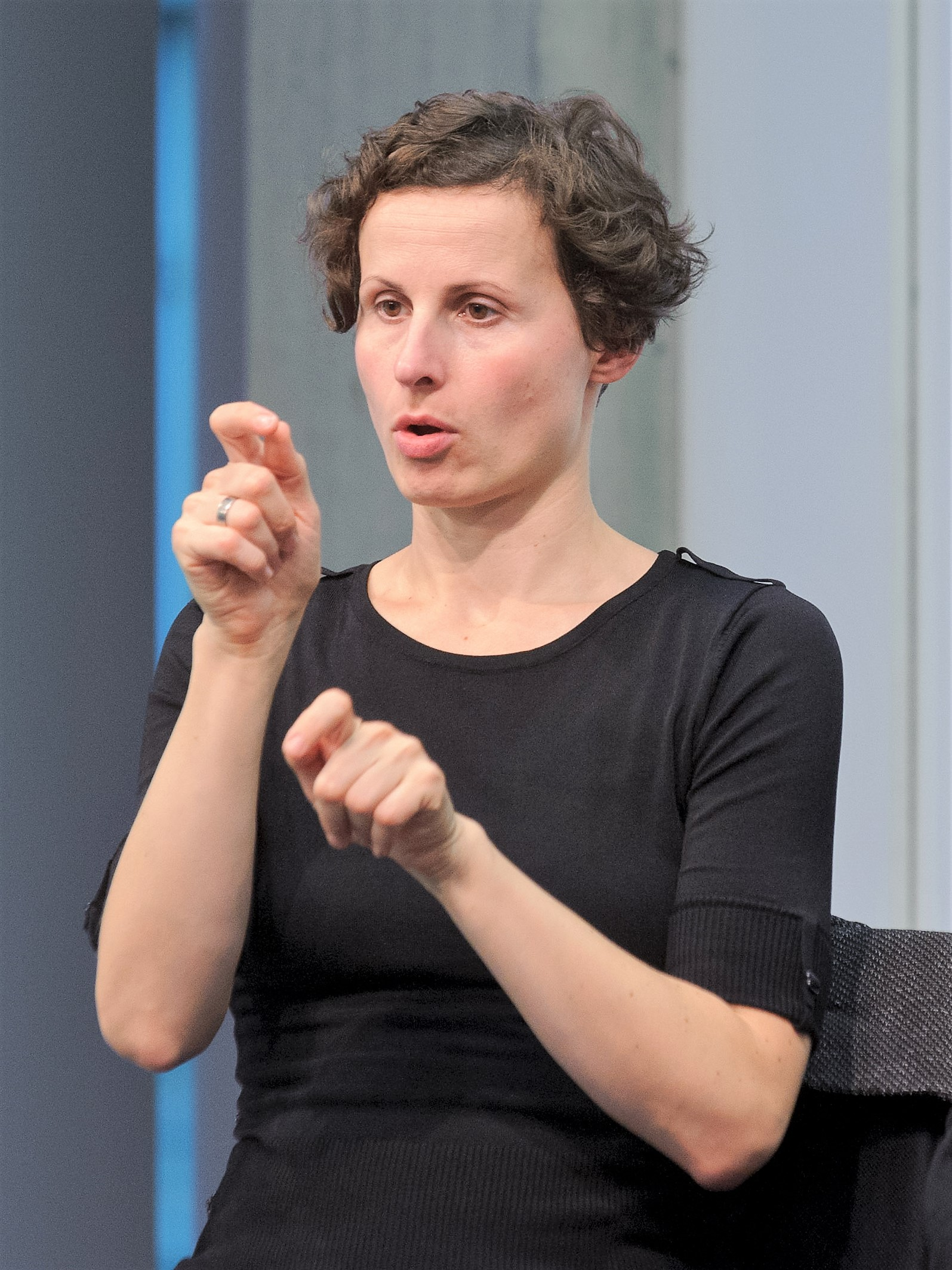 Eine Gebärdensprachdolmetscherin übersetzt bei einer Konferenz der Heinrich-Böll-Stiftung in Deutsche Gebärdensprache (DGS).Foto: Stephan Röhl